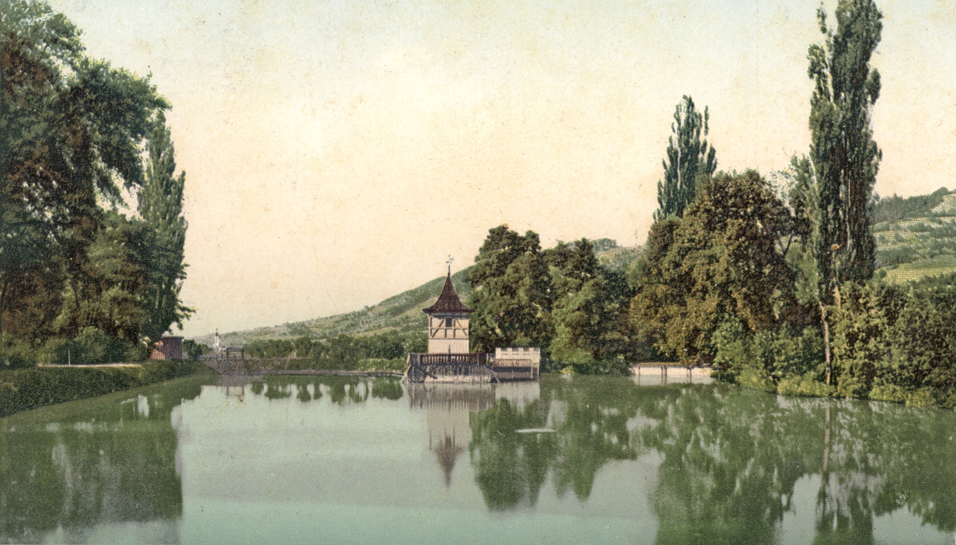 Gradnteich in Micheldorf mit Badehäuschen, colorierte Postkarte von "F. E. Brandt in Gmunden"